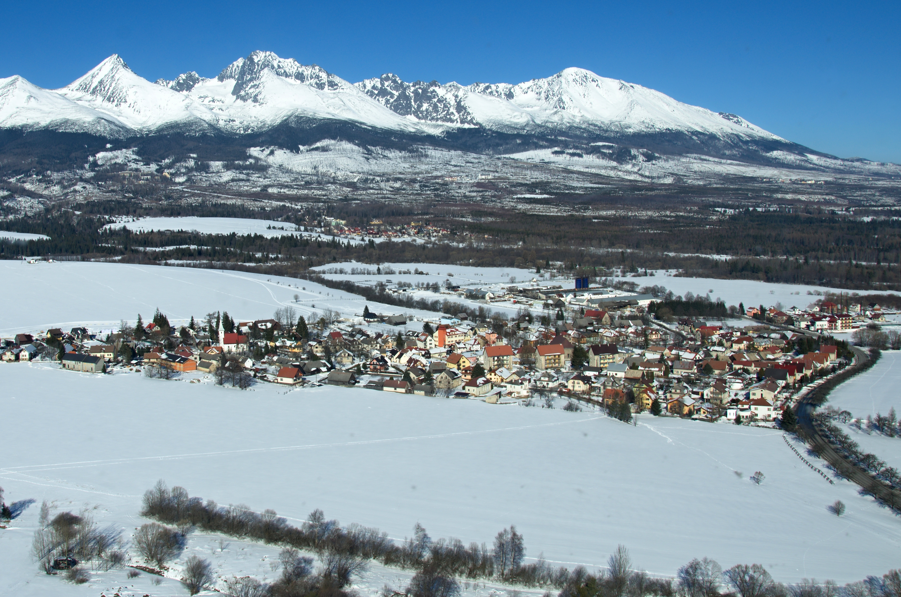 Mengusovce, v pozadí Vysoké Tatry